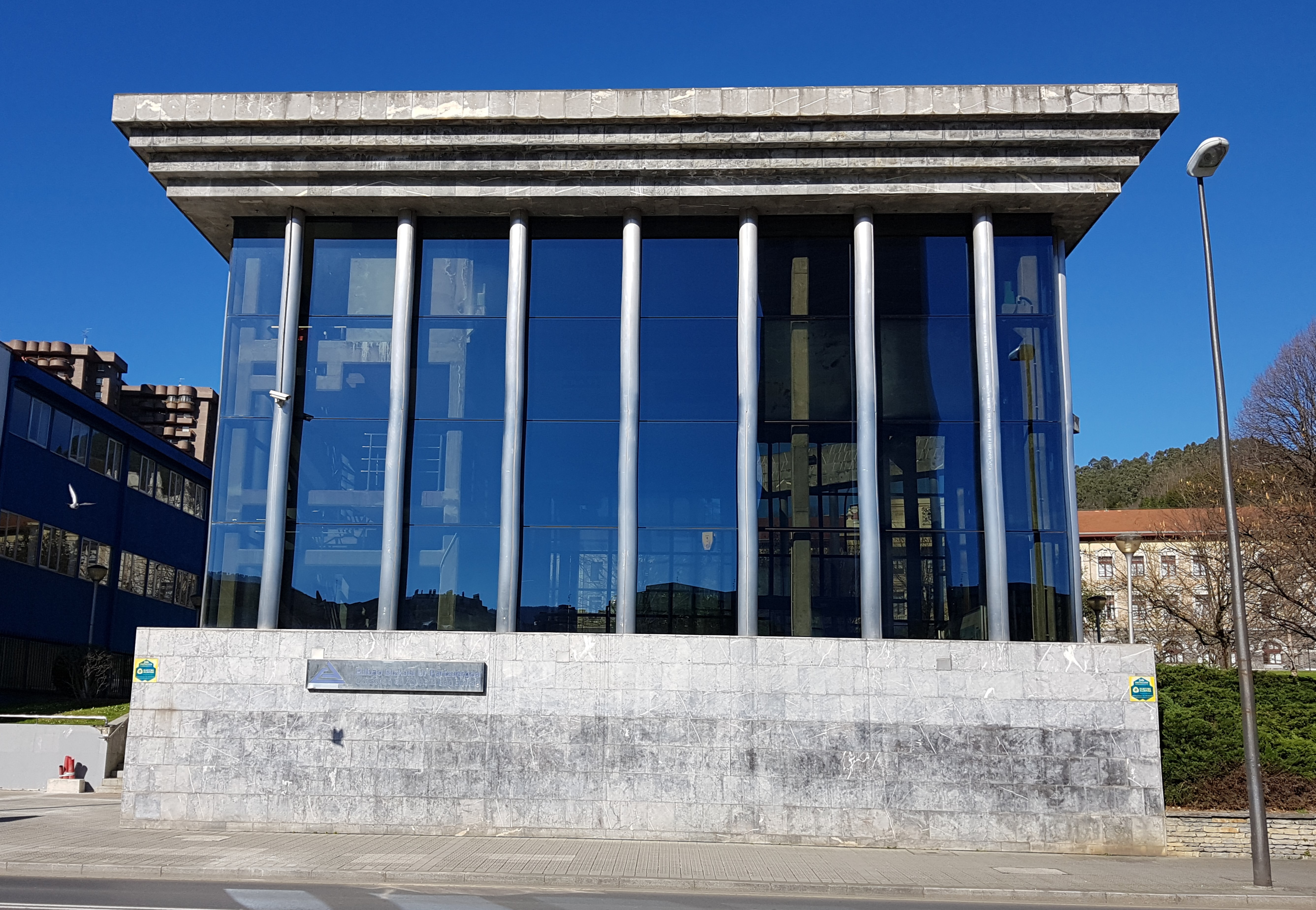 Edificio del Consorcio de Aguas Bilbao Bizkaia en Deusto